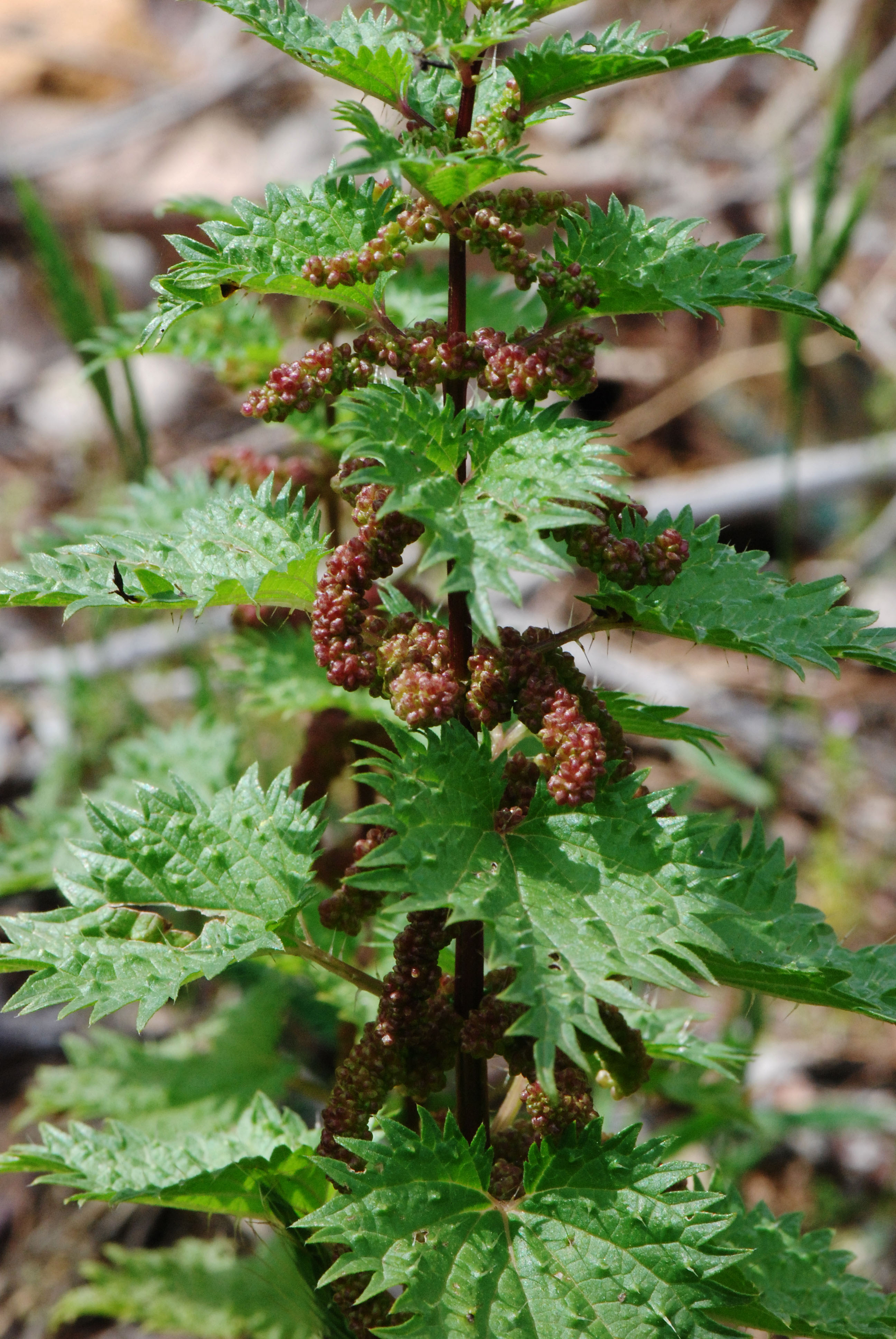 Urtica atrovirens, ortie noirâtre, urtica corsa,Corse